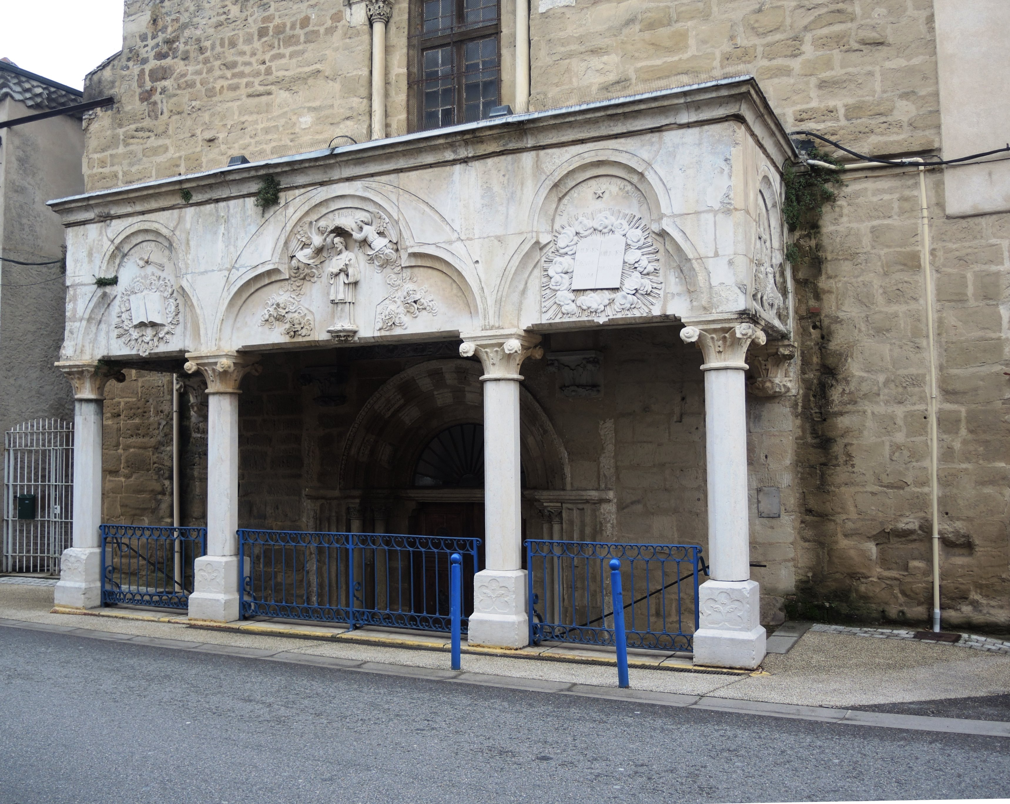 Andance vue générale et détails